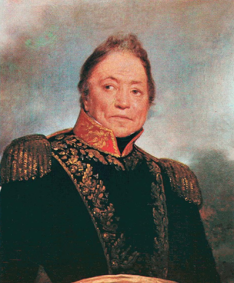 General Francisco de la Lastra. Óleo por Raymond Monvoisin, en propiedad de Teresa Amunátegui de la Lastra.